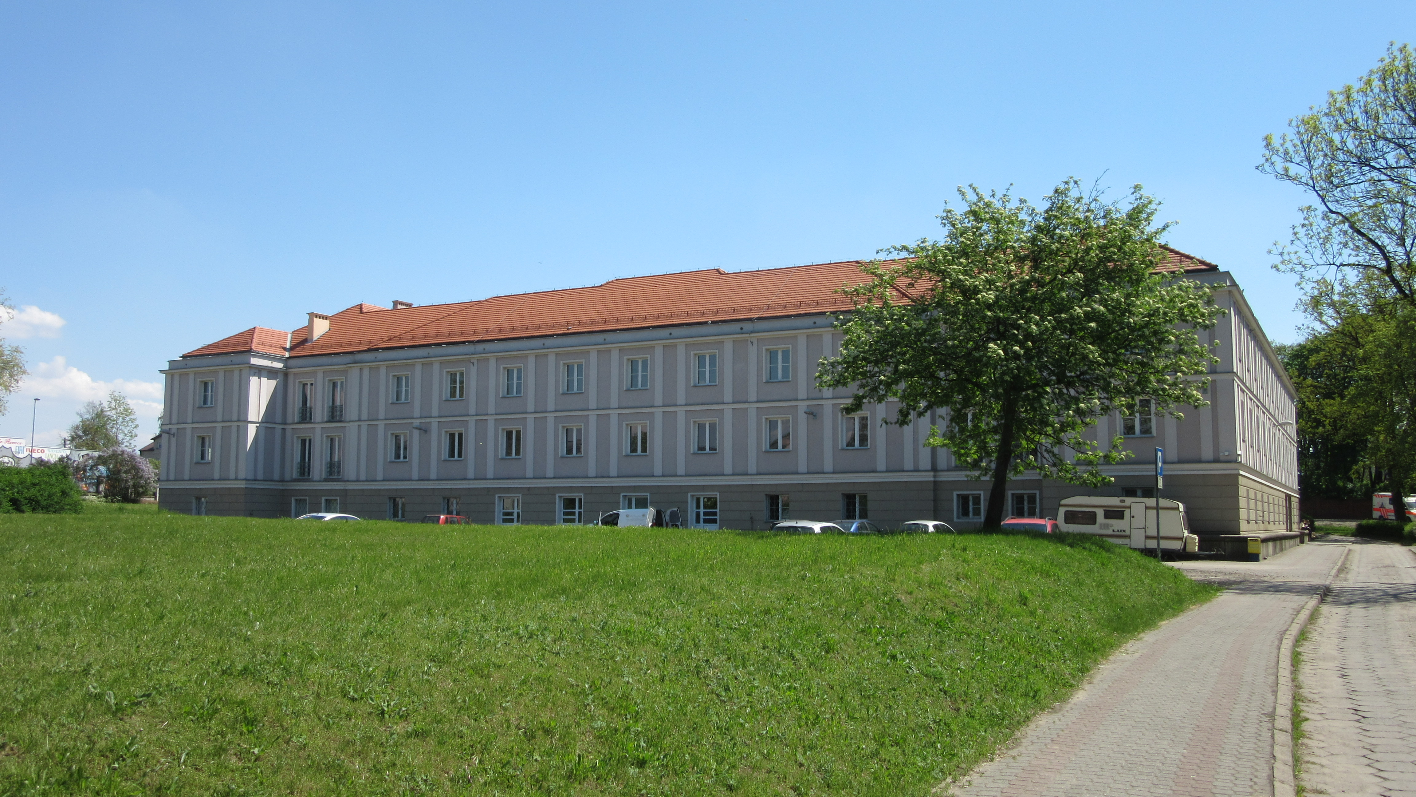 Gmach Collegium Medicum Państwowej Wyższej Szkoły Zawodowej im. Prezydenta Stanisława Wojciechowskiego w Kaliszu